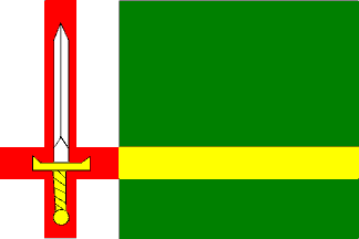 vlajka obce Zdechovice